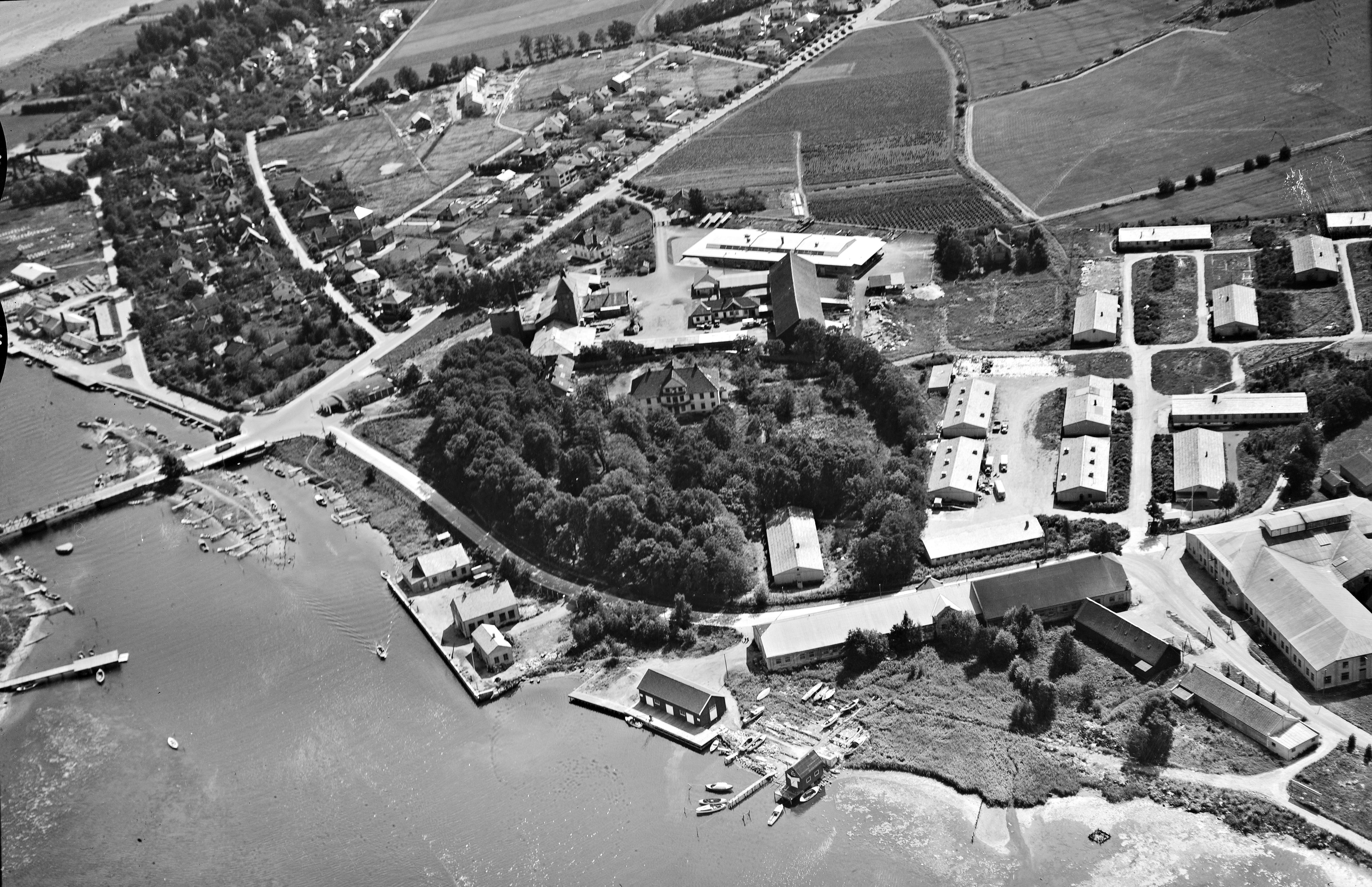 WF.S.uten_nummer_A964